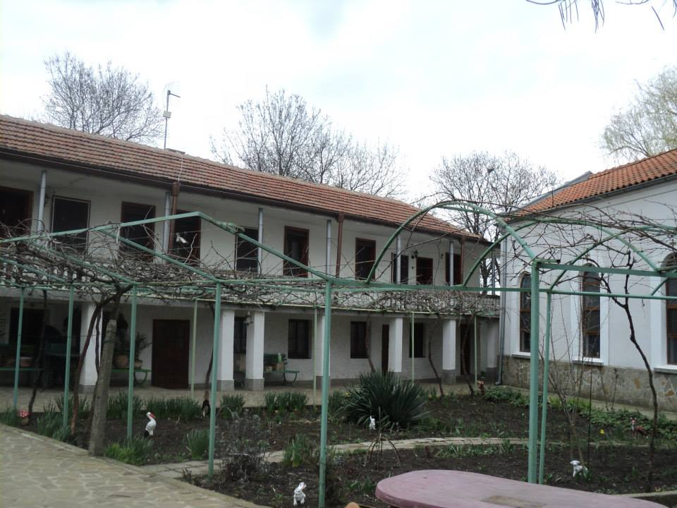 Кабиле